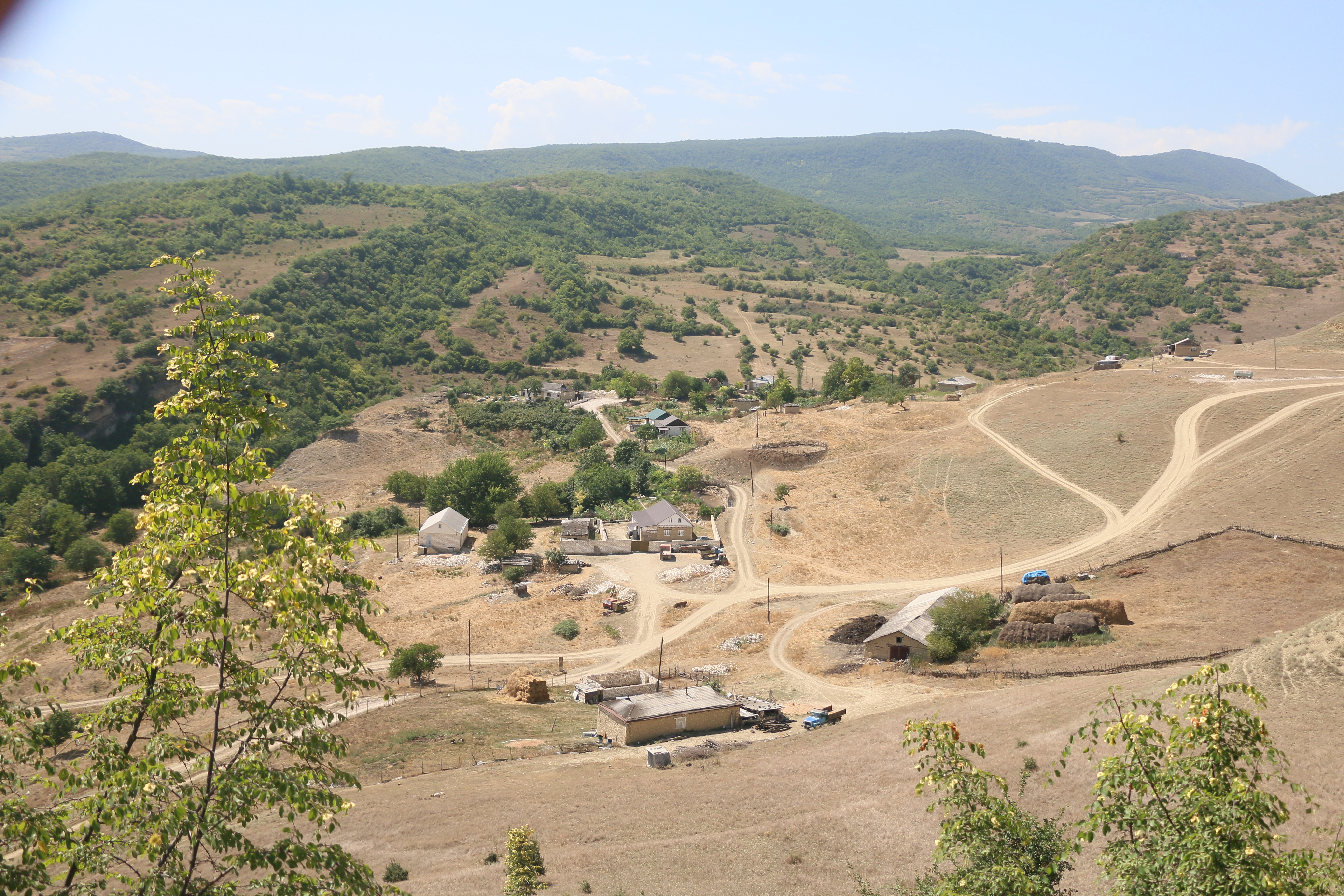 Заза. 22.08.2017